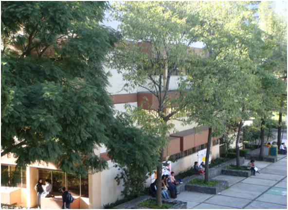 edificio B de psicologia posterior